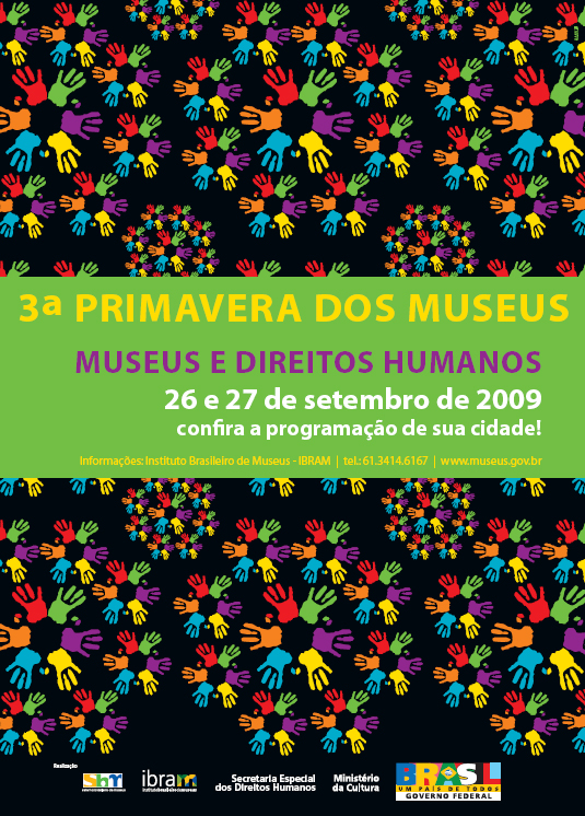 Arte do cartaz da 3ª Primavera dos Museus disponível no acervo digital do Ibram.